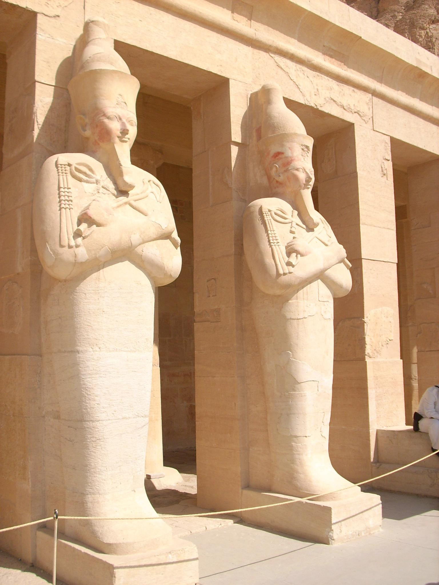 Posągi Hatszepsut w jej świątyni (tzw. filary ozyriackie)